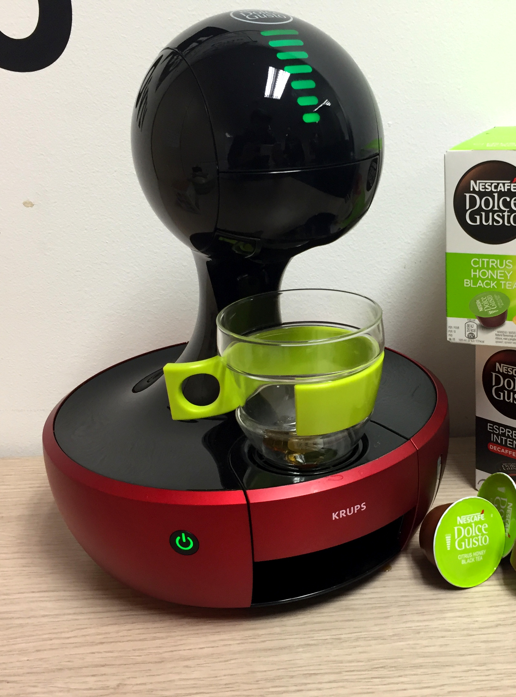 La cafetera Drop, el nuevo modelo de Nescafé Dolce Gusto, ganadora del premio Red Dot de diseño 2016, junto con cajas de nuevas variedades de té y café de Nescafé Dolce Gusto: Citrus Honey Black Tea y Espresso Intenso Descafeinado. Taza de la colección pop de la marca.